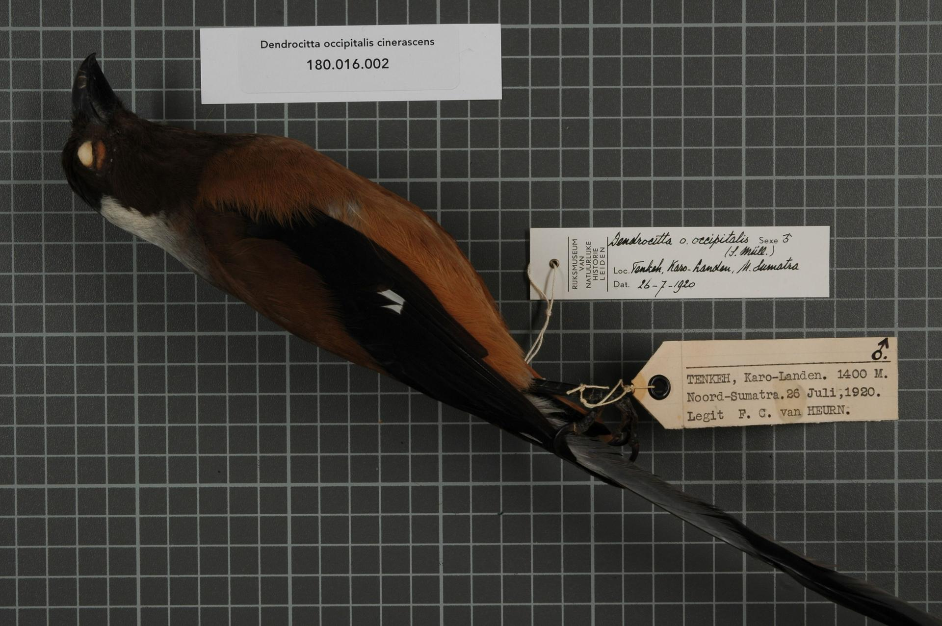 Dendrocitta occipitalis cinerascens Sharpe, 1879